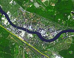 Luftbild_Berlin_Schoeneweide (Public Domain)